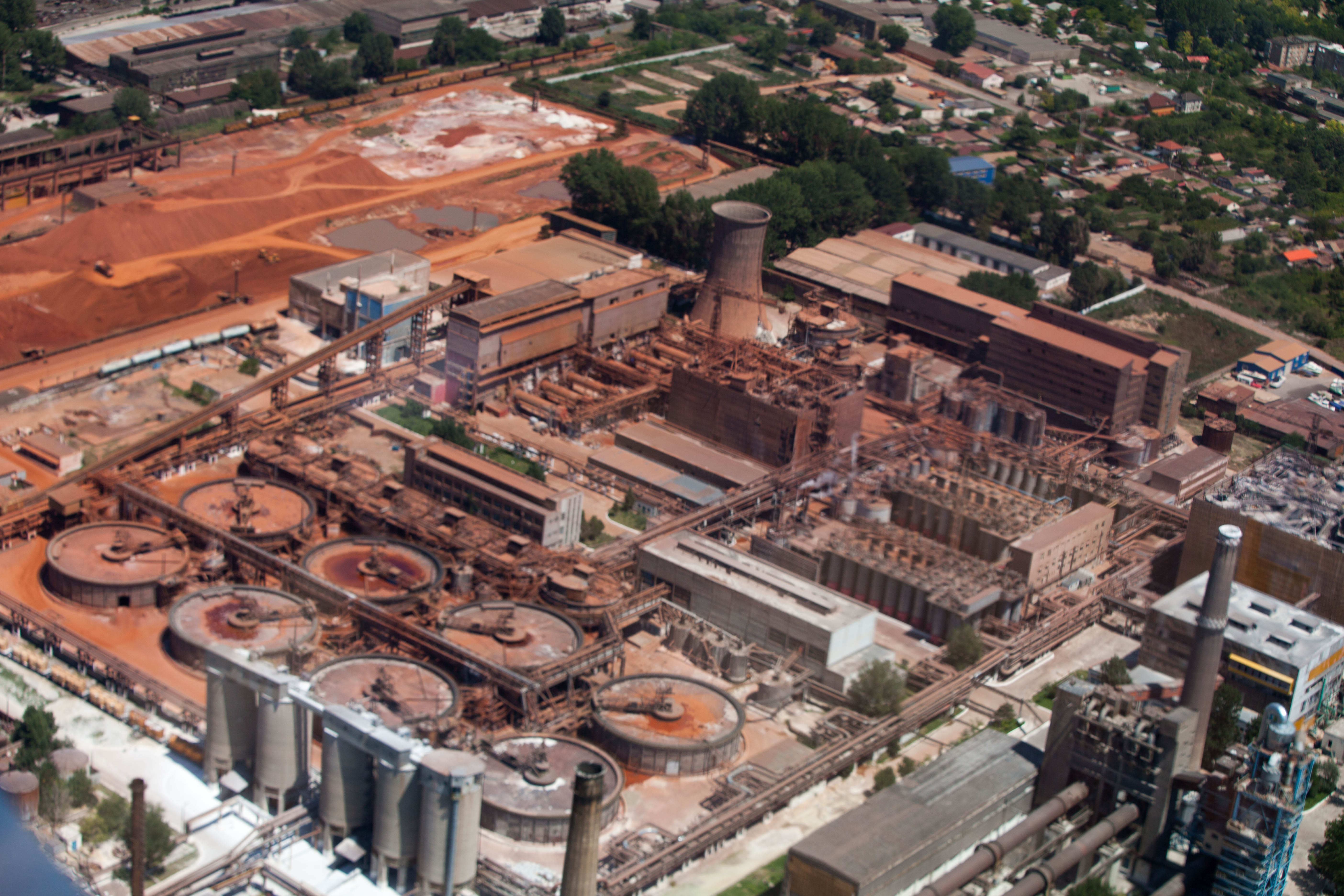 Factory near Tulcea, Romania